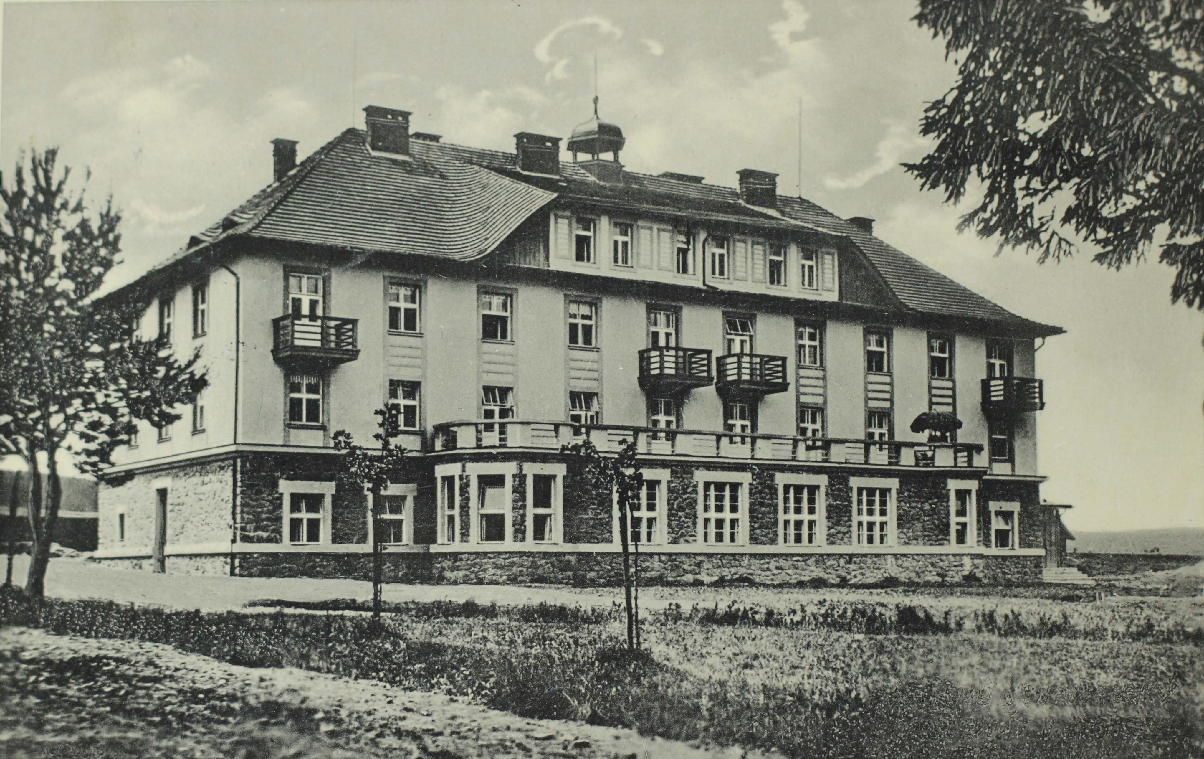 Penzion Třemšín, Rožmitál pod Třemšínem na konci 20. let